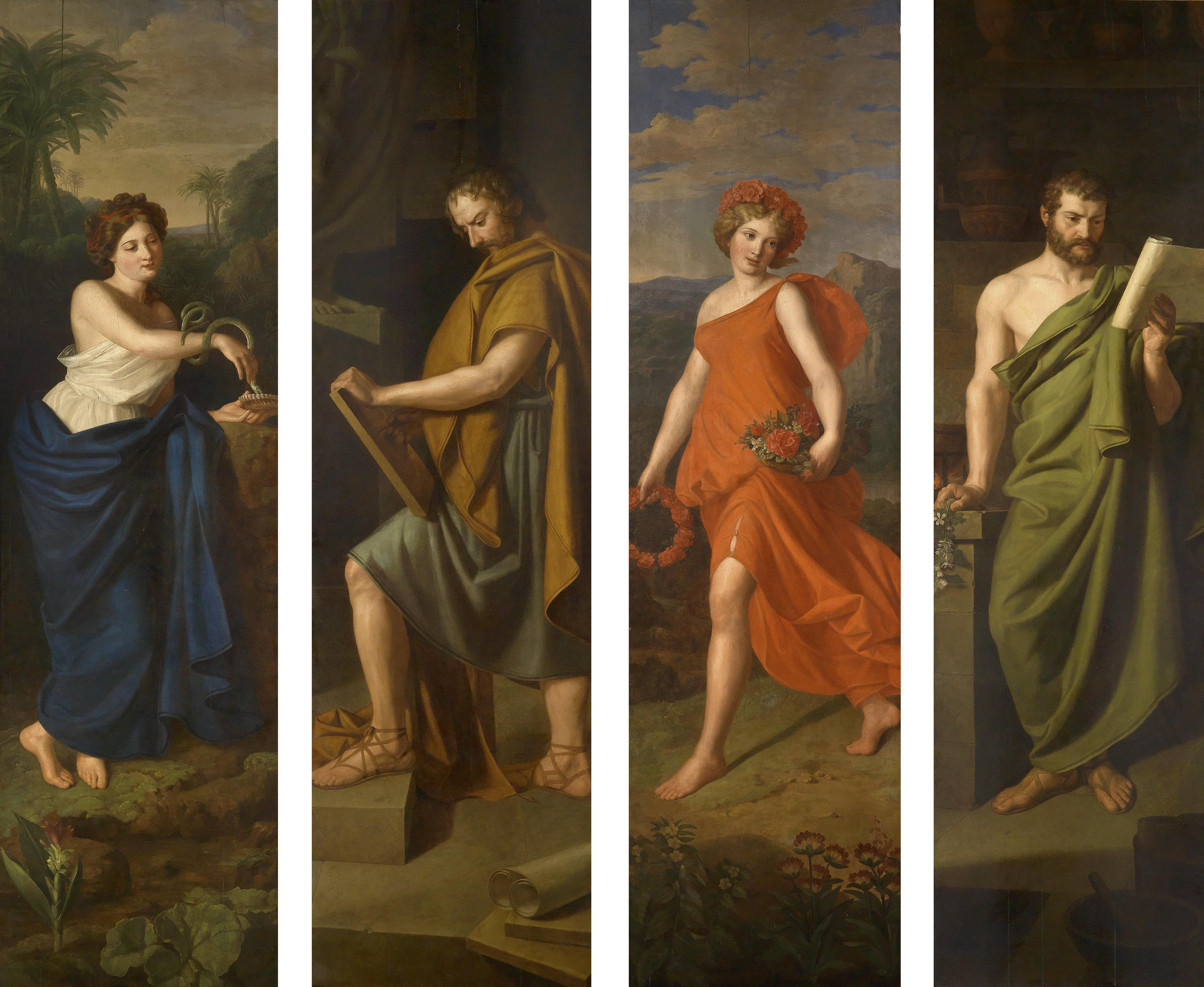 Vier Ladenschilder (Hygieia) für die Apotheke "Zum goldenen Löwen" in der Josefstadt